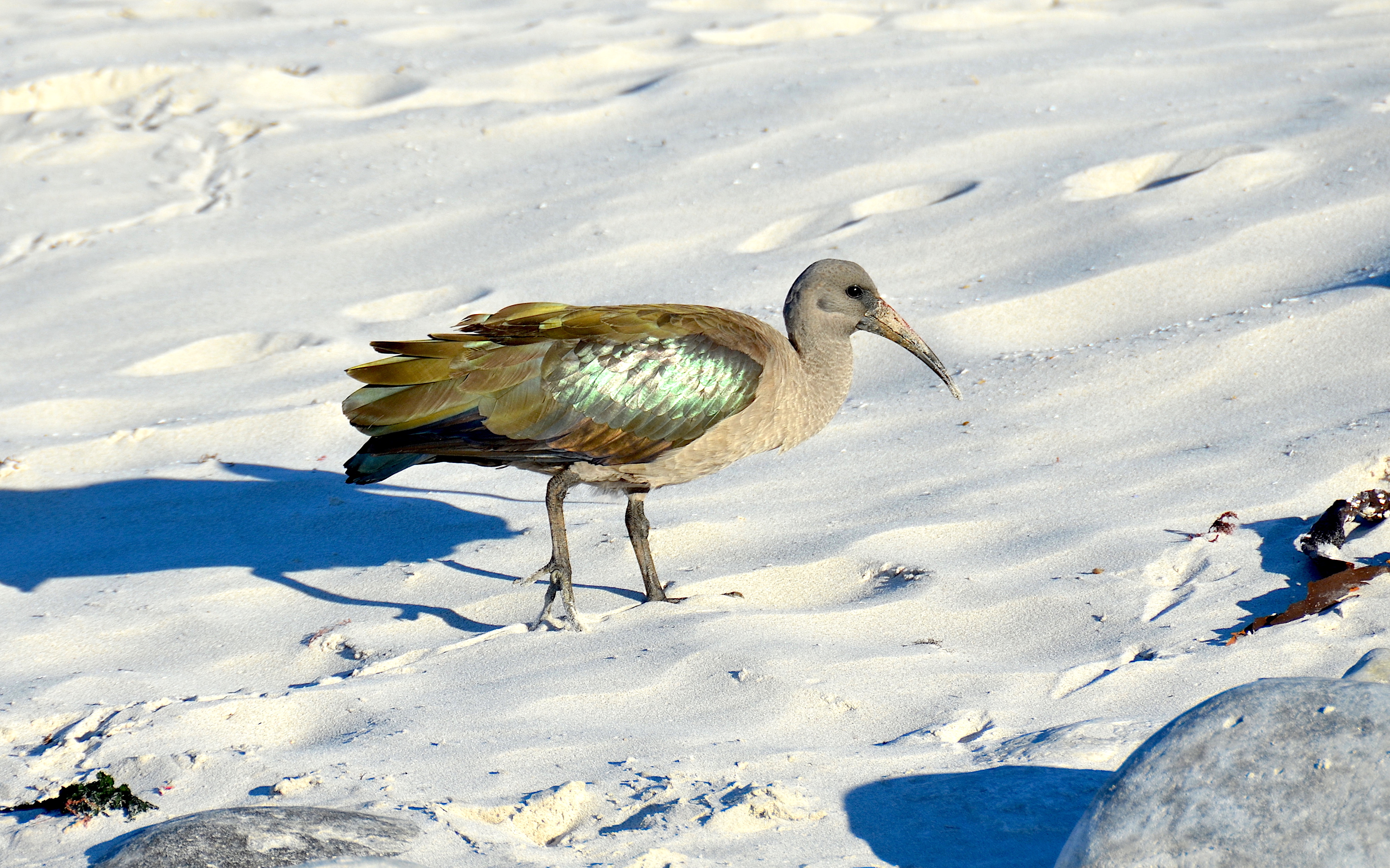 Hagedasch am Noordhoek Strand in Südafrika (2017)